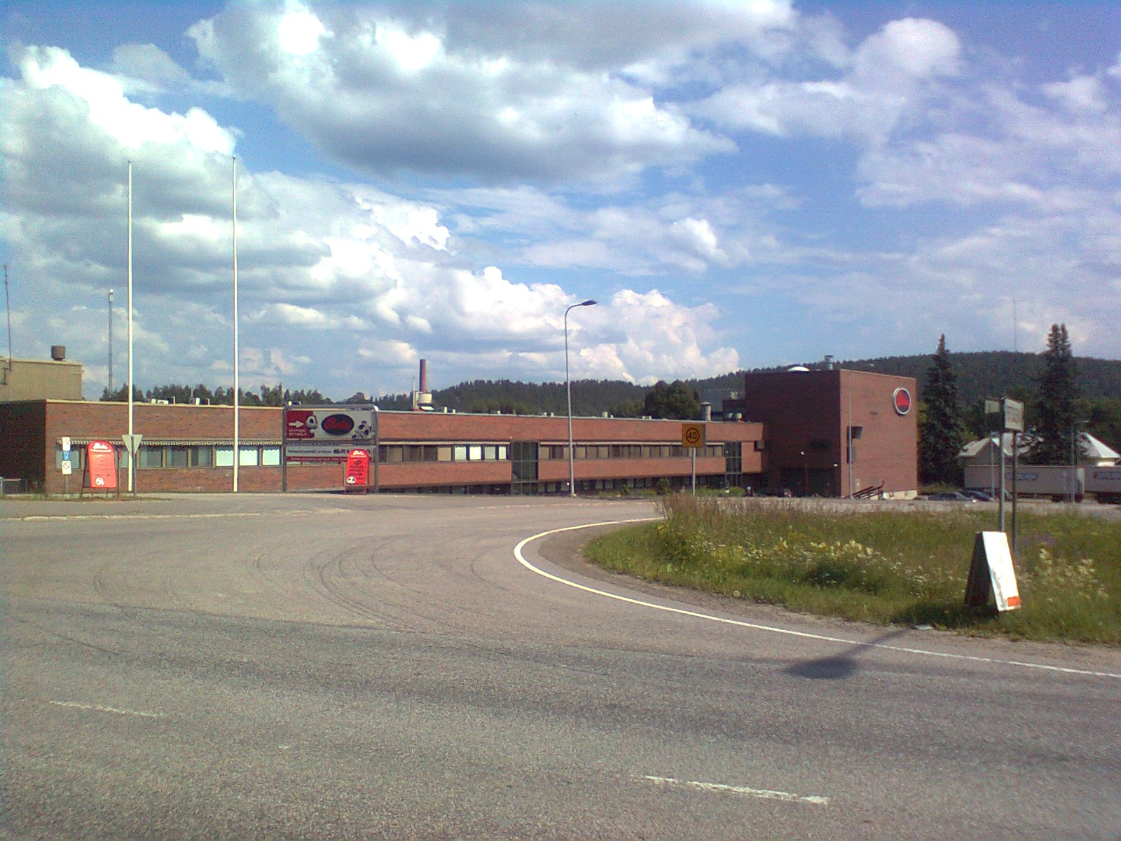 Pandan uudempi makeistehdas kesällä 2011.